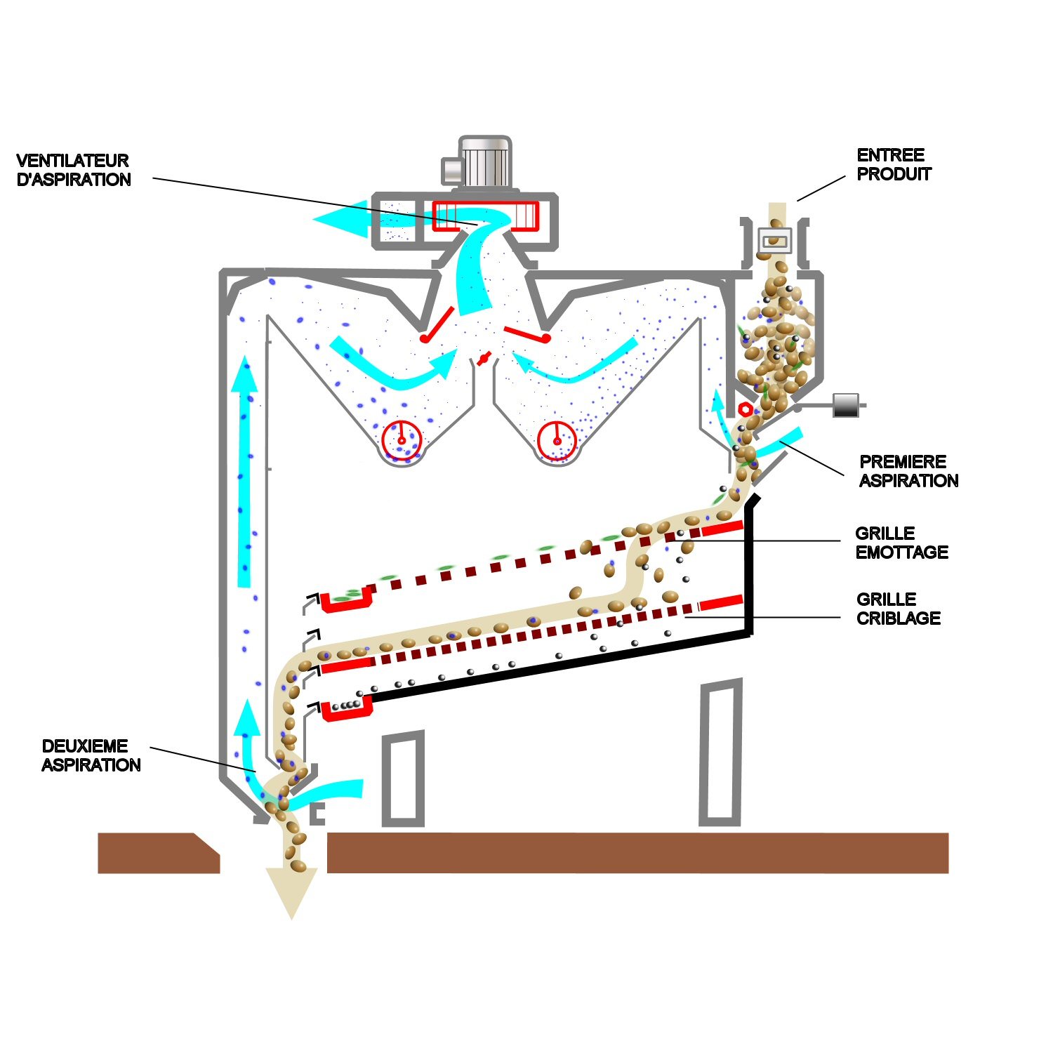 Séparateur plan NSD1 Denis